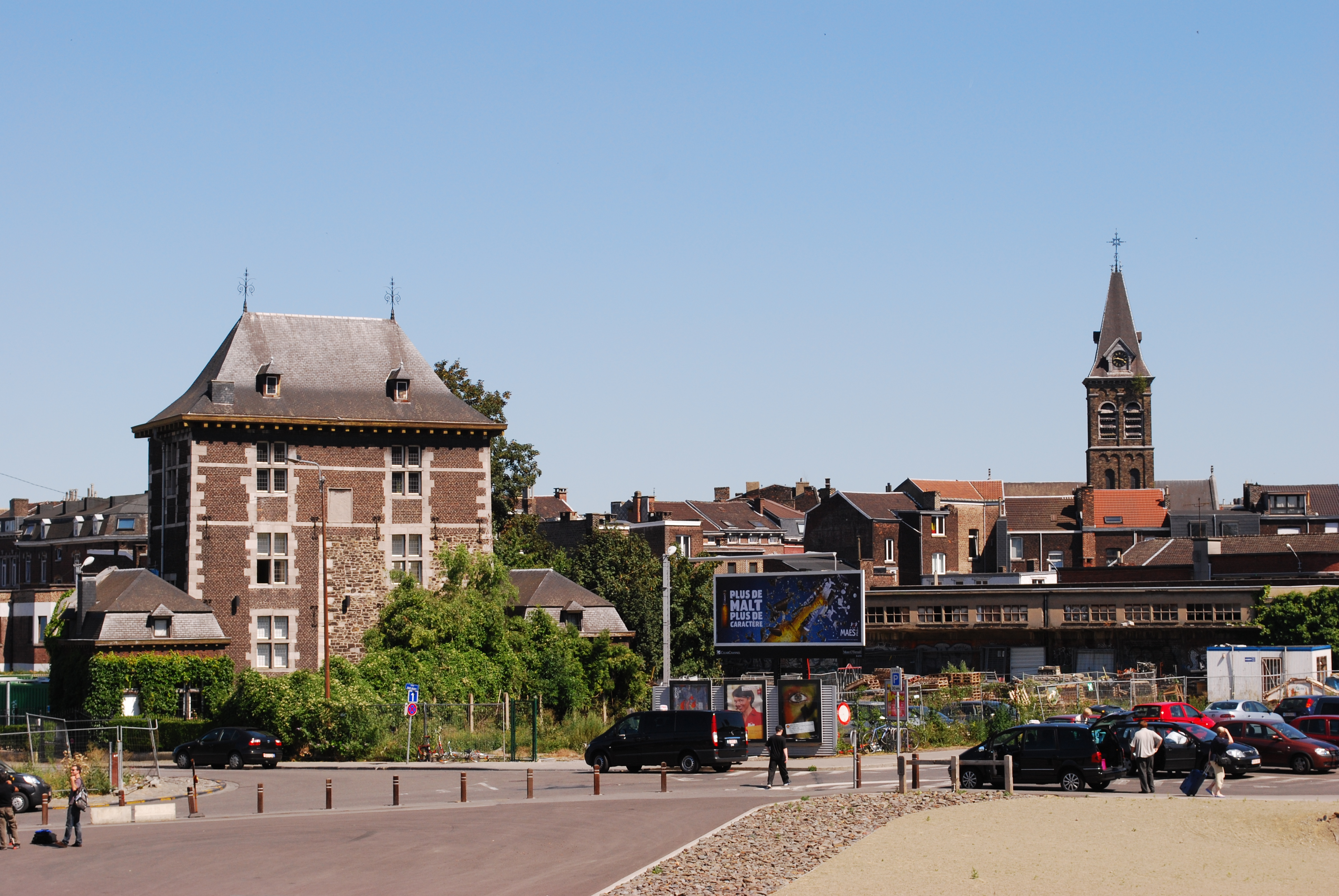 La rue Bovy à Liège ; à l'arrière-plan, le clocher de l'église Sainte-Marie des Anges.